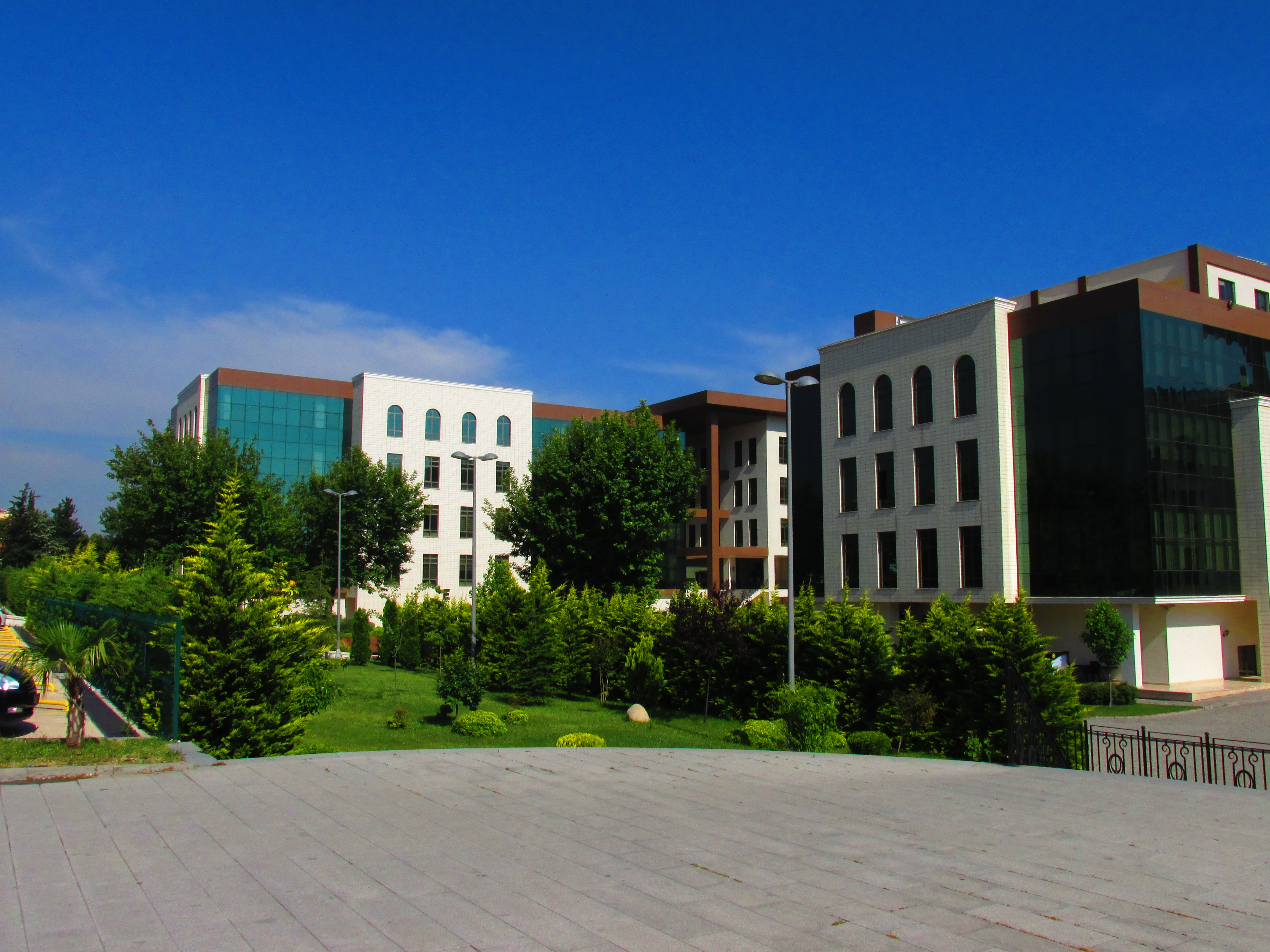 Bursa Teknik Üniversitesi Mimar Sinan Yerleşkesi